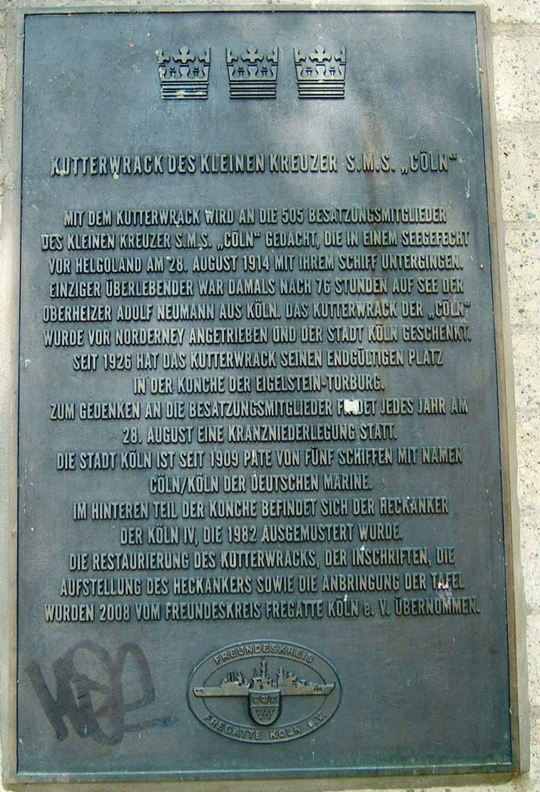 SMS Cöln Tafel an der Eigelsteintorburg in Köln zum Untergang